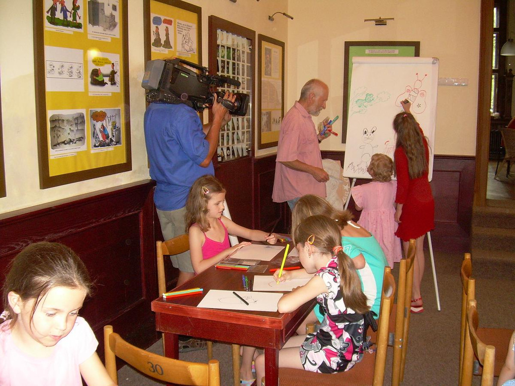 Aranĝo "Desegnado kun Pavel Rak" kadre de la inaŭguro de la tutjara ekspozicio "Desegnita humuro de Pavel Rak", konata ĉeĥa ilustristo, karikaturisto kaj esperantisto, en Muzeo de Esperanto en Svitavy (Ĉeĥio) la 12-an de junio 2010